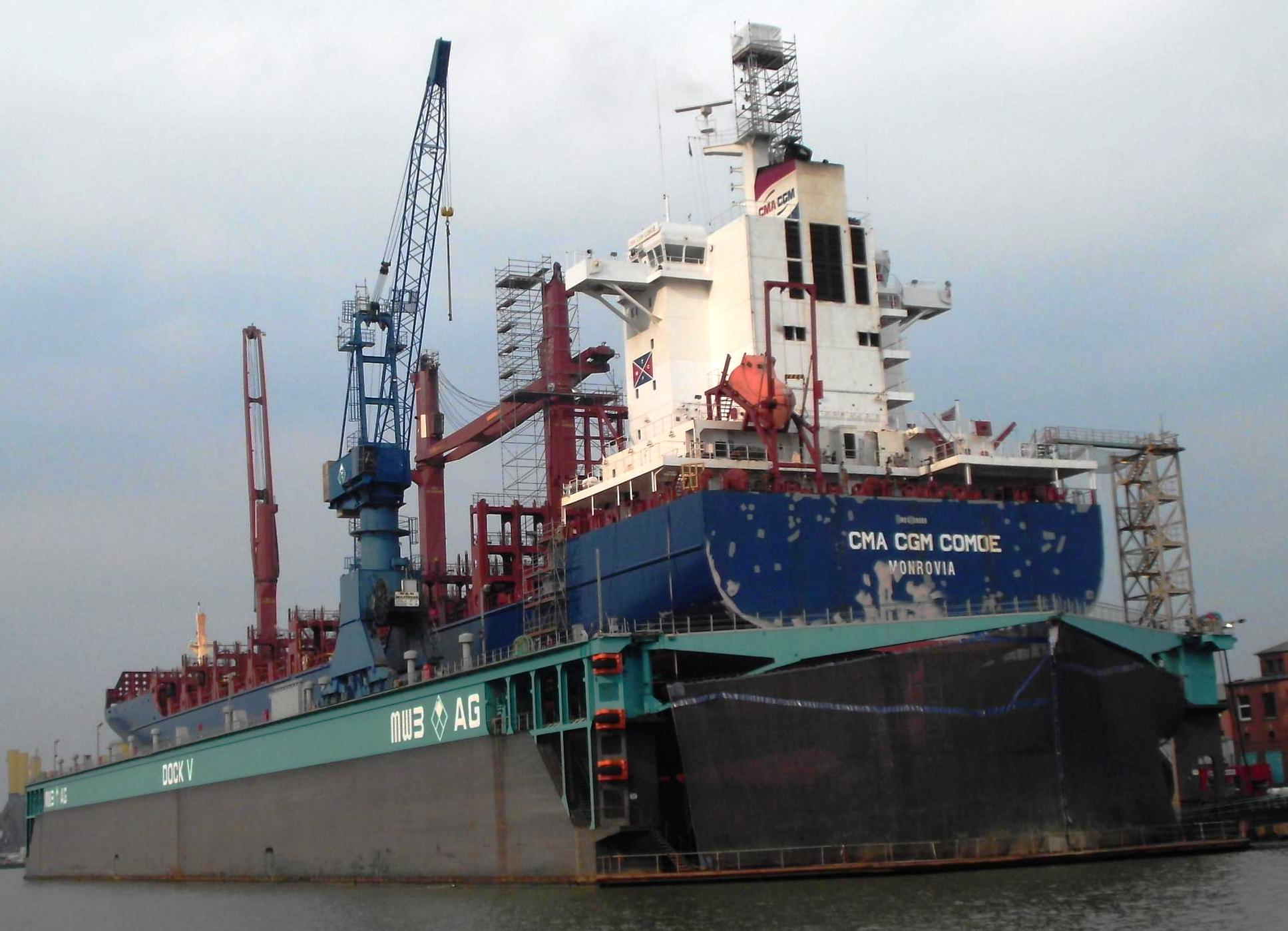 MWB Schwimmdock